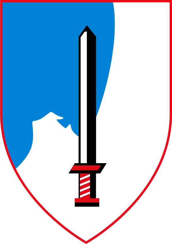 תג יחידה שירות בעלי חיים מ־1948. פיתוח וקטורי על ידי Matankic.